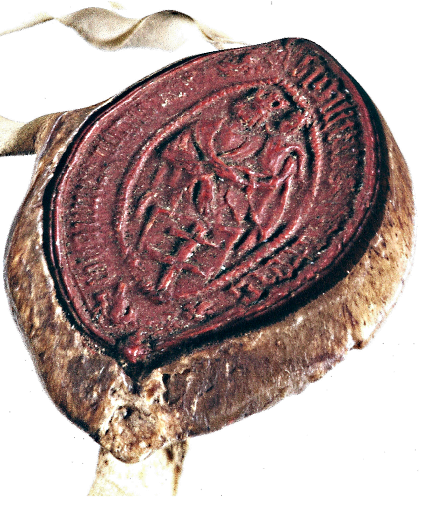 Urkundensiegel des Meisters der Kreuzherren zu Neiße, Johannes VII Unglaube von 1496